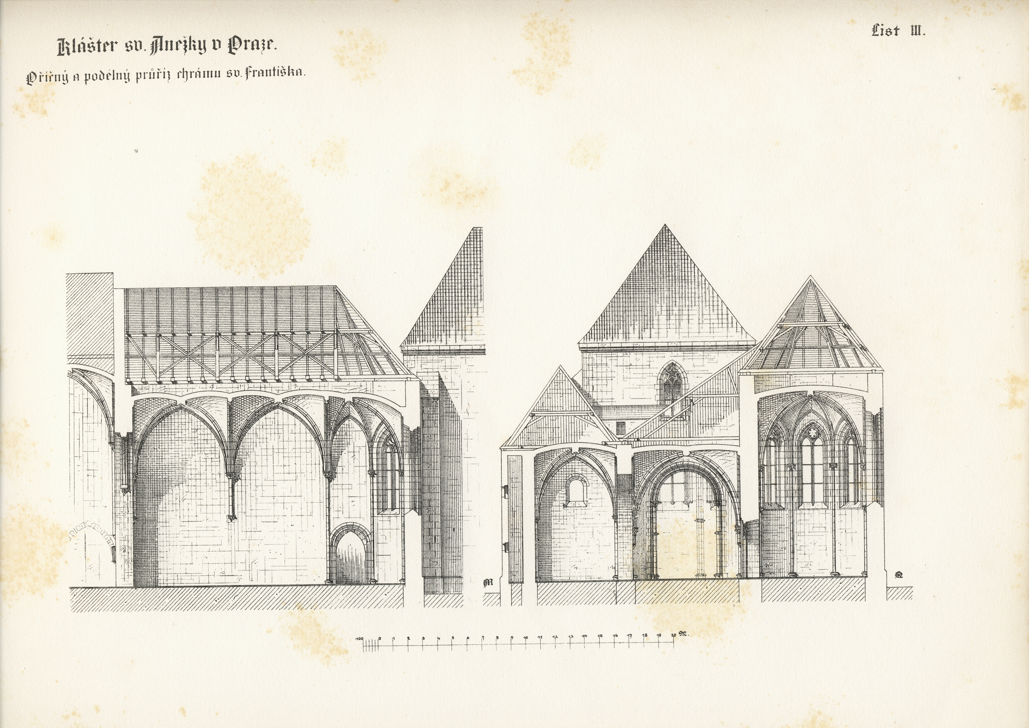 obrazová příloha knihy Klášter blahoslavené Anežky v Praze v ohledu dějepisném i uměleckém